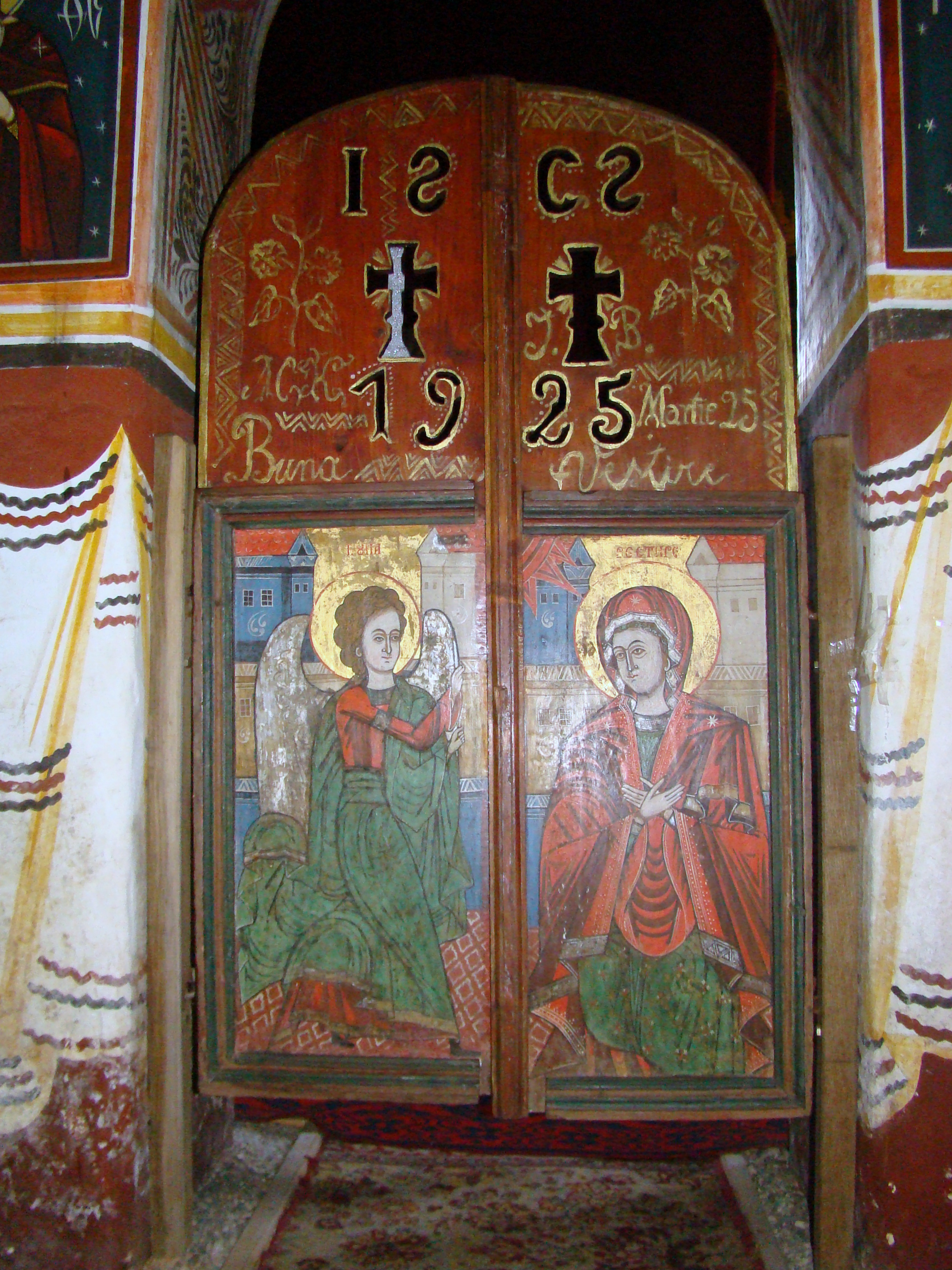 Biserica "Naşterea Domnului" , sat SĂRATA; comuna PORUMBACU DE JOS